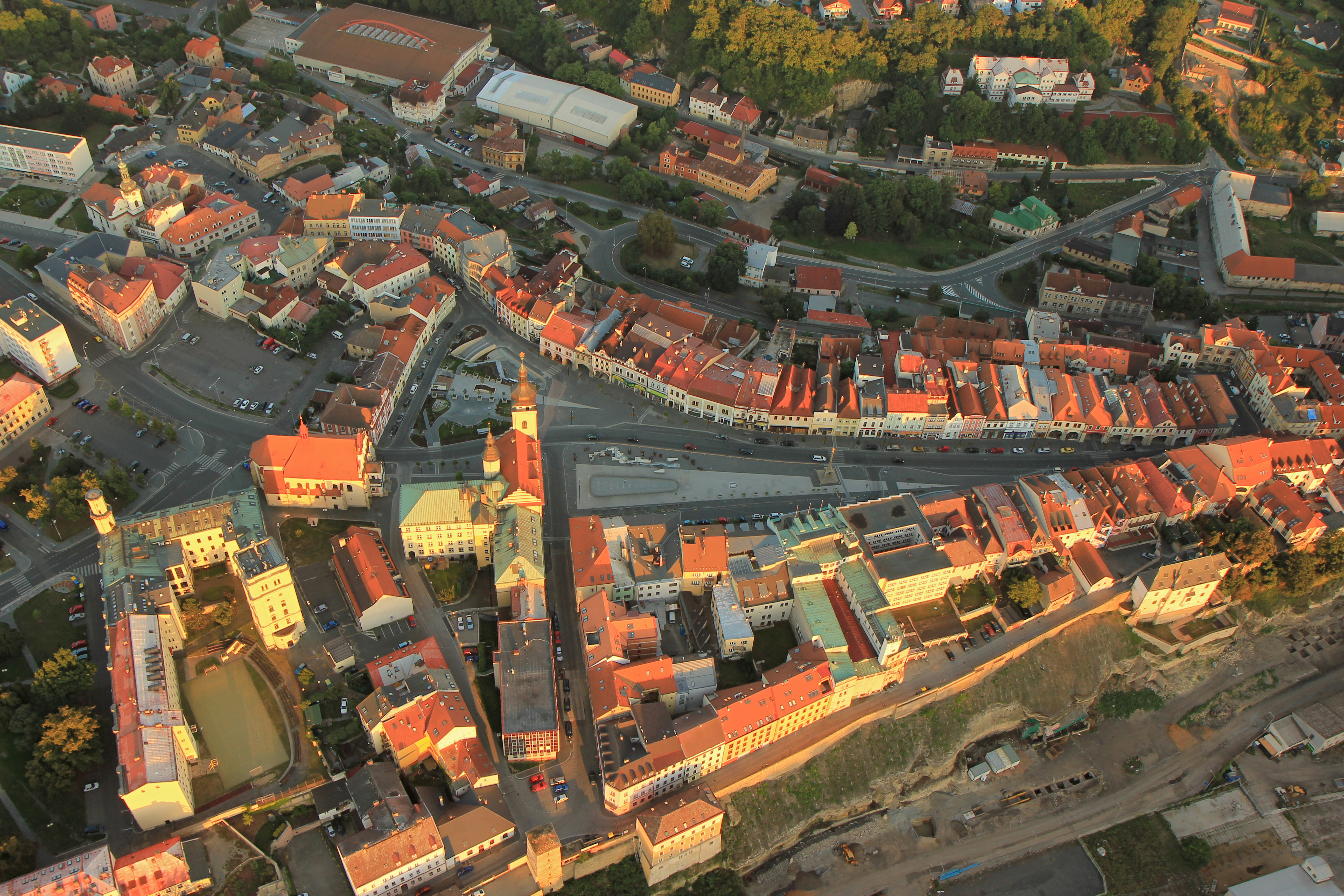 Kostel Nanebevzetí P. Marie (Mladá Boleslav), Kateřiny Militké, Mladá Boleslav